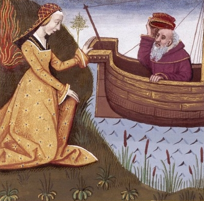 Une femme de Lemnos, Hypsipyle, sauve son père Thoas alors que les autres Lemniennes tuent tous les hommes de l'île. Miniature extraite du De mulieribus claris de Boccace.